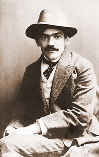 Nagy Endre (1877– 1938) magyar író